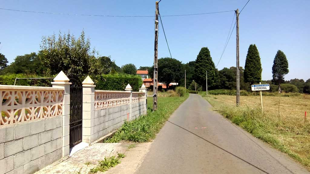 Vista do Pereiral, Curtis.